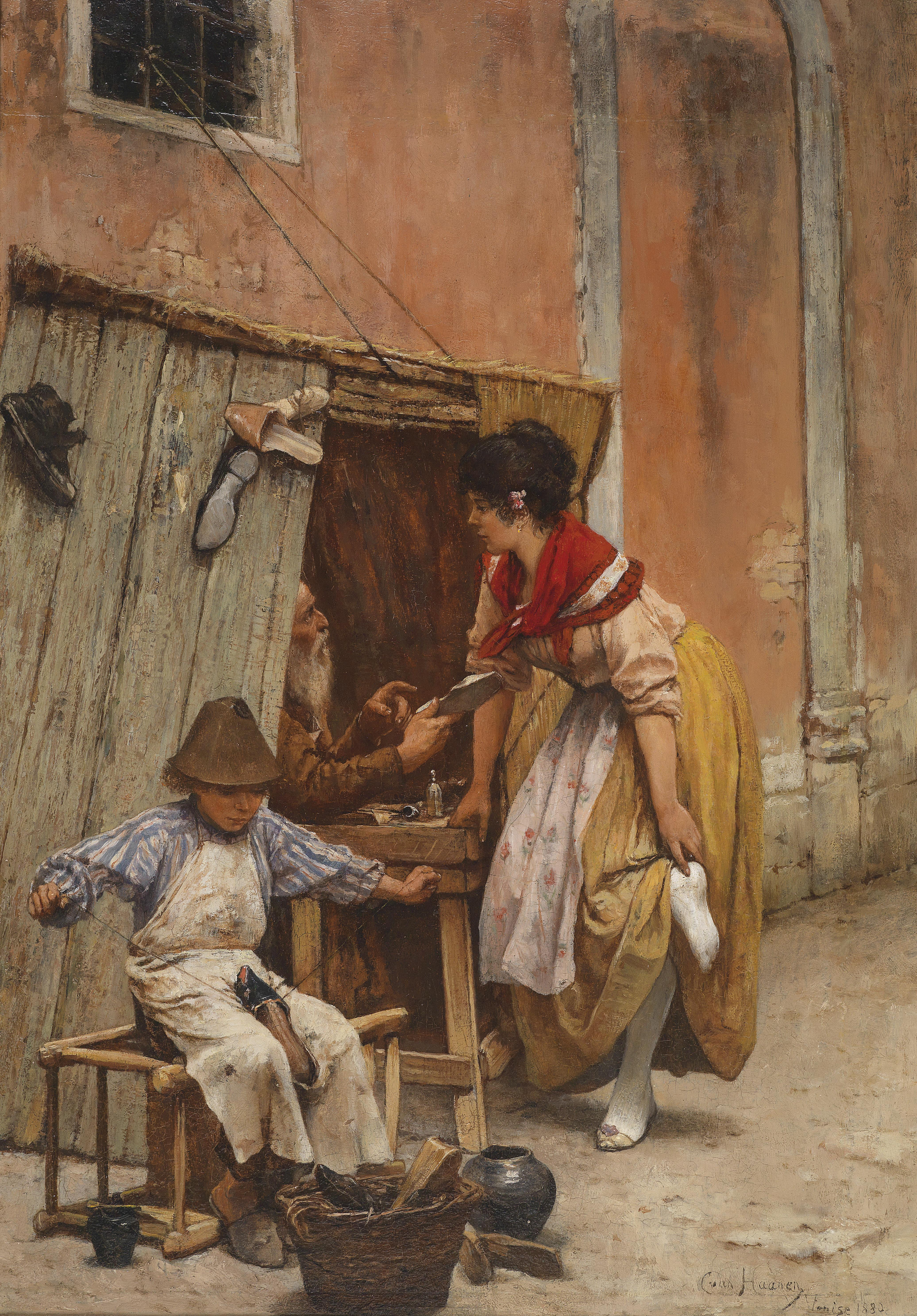 Der Schuh drückt!, signiert, bezeichnet, datiert C. von Haanen Venise 1880, Öl auf Holz, 47,5 x 33 cm